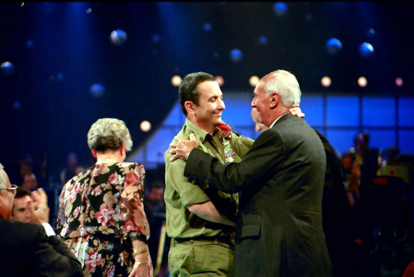 טייס הסבנה רגי'נלד לוי בפגישה מחודשת ומפתיעה עם מפקד החילוץ אהוד ברק